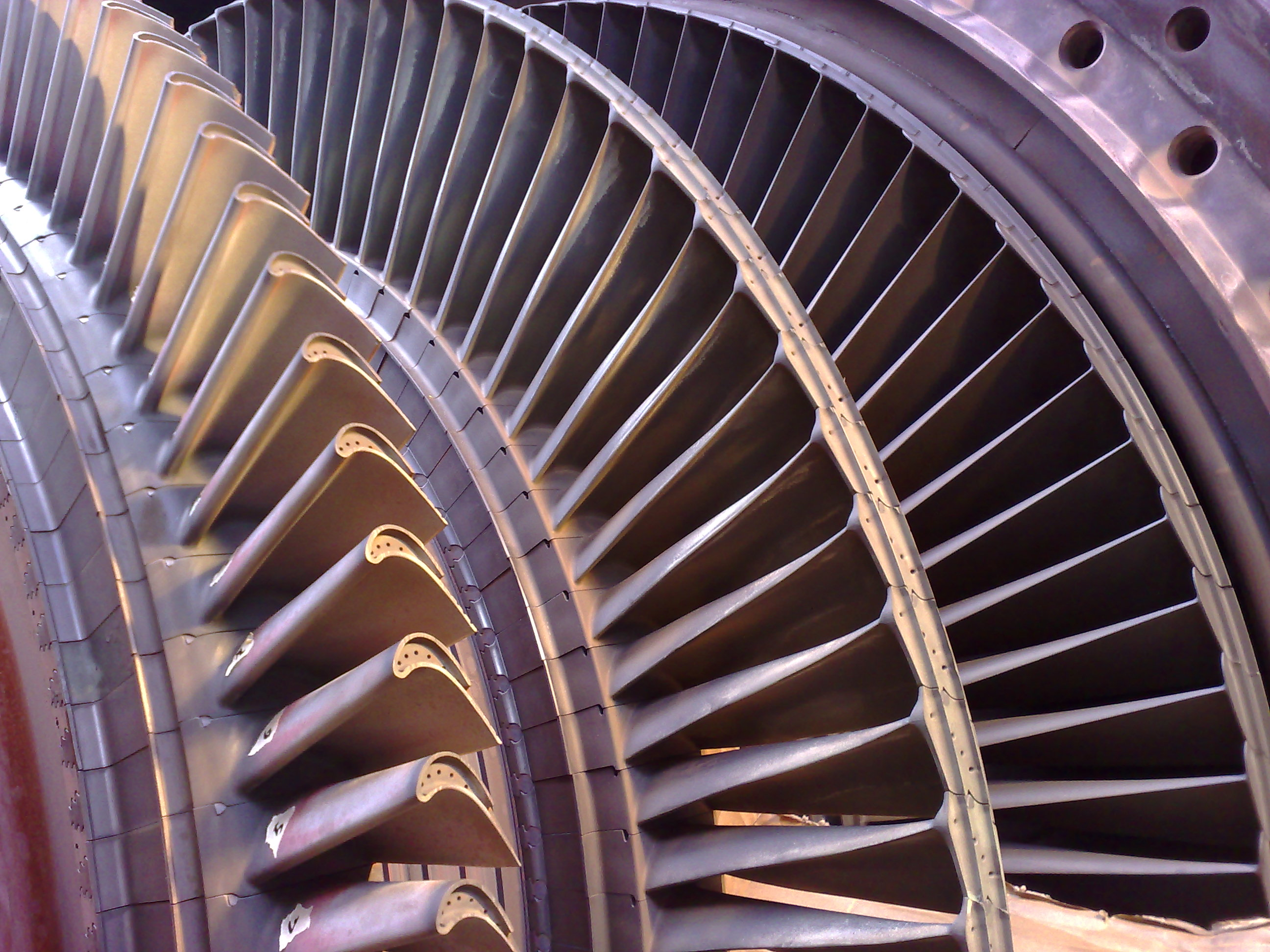 Aeroderivative gaz türbinlerine ait tüm paket parçalarını müşterilerimize tedarik ediyoruz. LM2500 ve LM6000 serilerinde sağladığımız yedek parça hizmetleri, ihtiyaclarınız ile ilgili teknik değerlendirme, yönlendirme ve gaz türbine & paket desteğini de içermektedir.